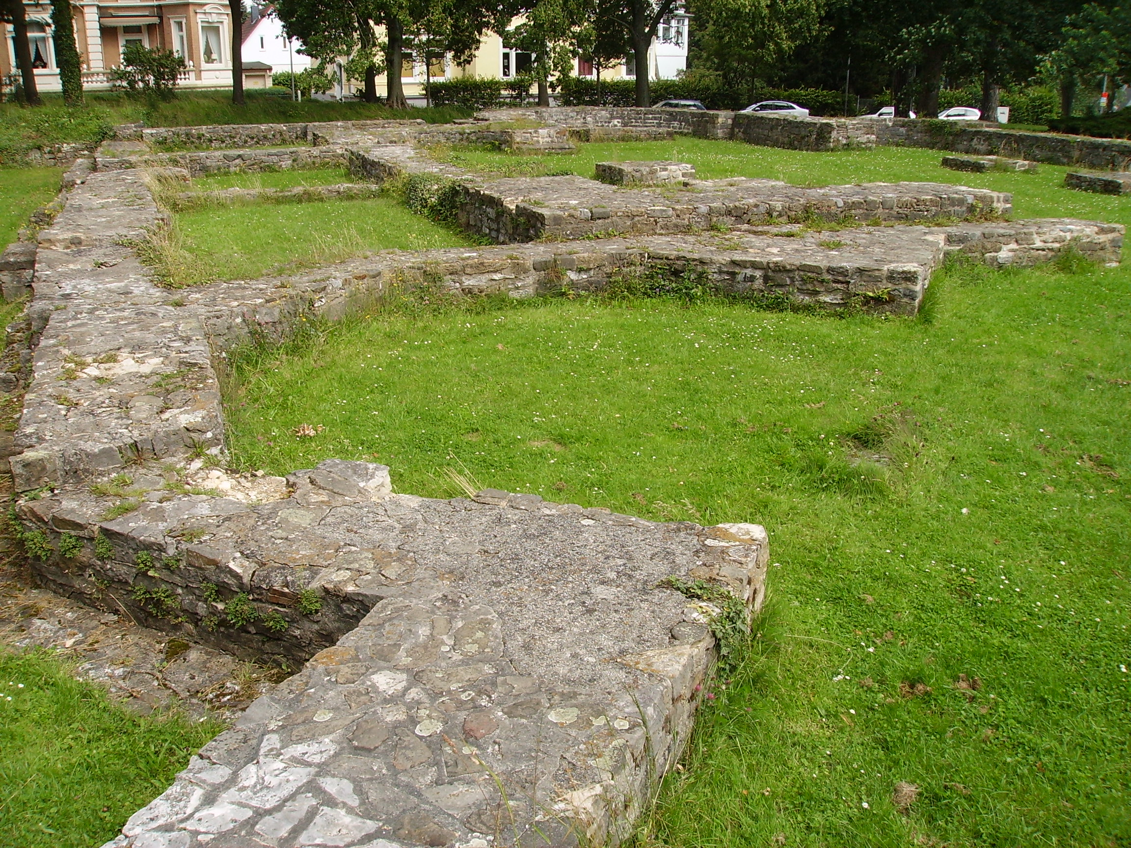 Stiftsruine St. Georg in Goslar: Nordöstliche Apside des Oktogon